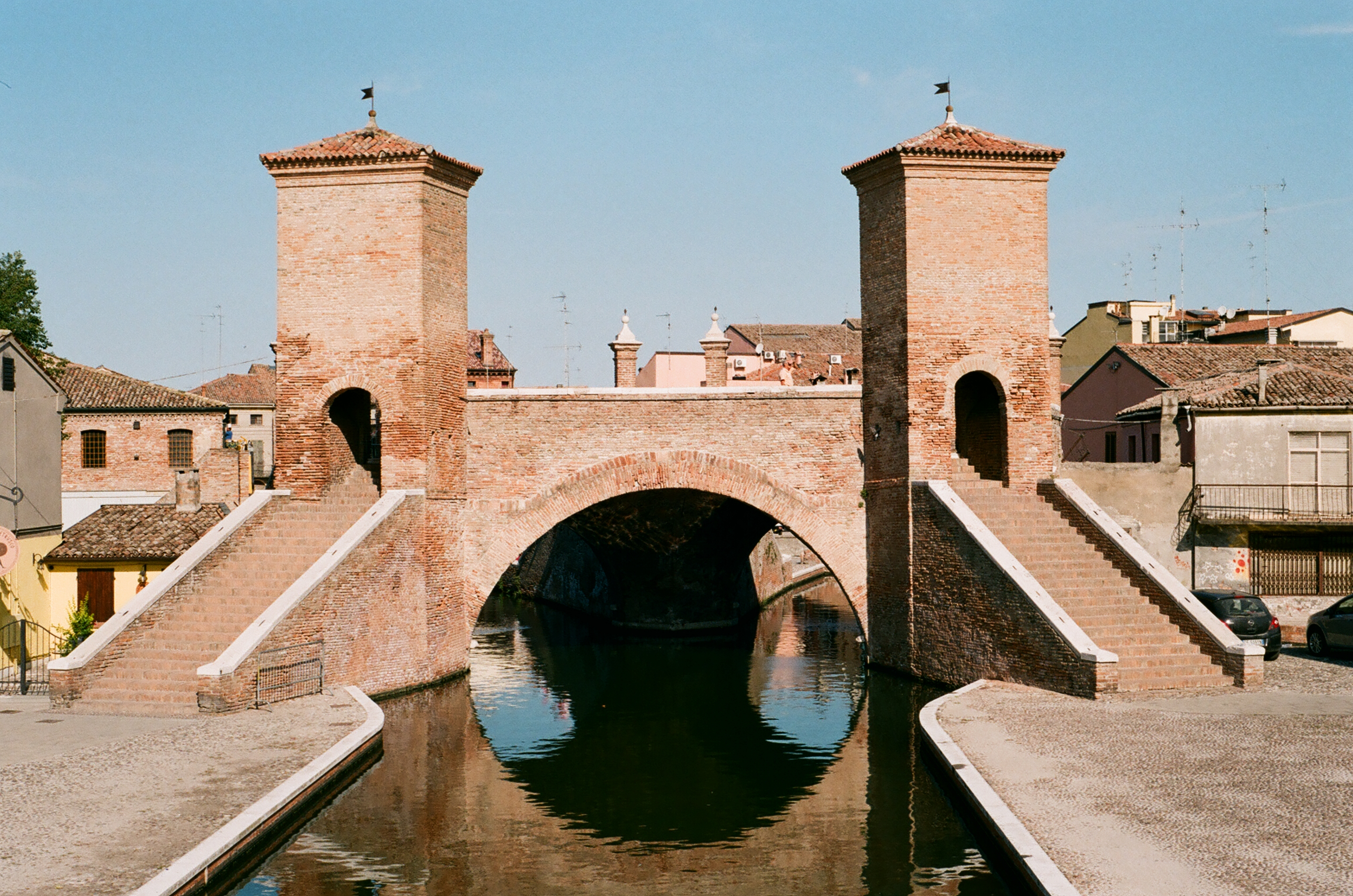 Gate to Comacchio